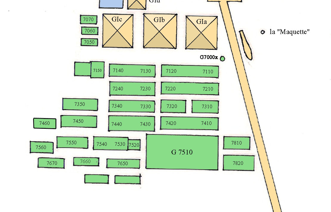 Carte du cimetière est de la nécropole de Gizeh